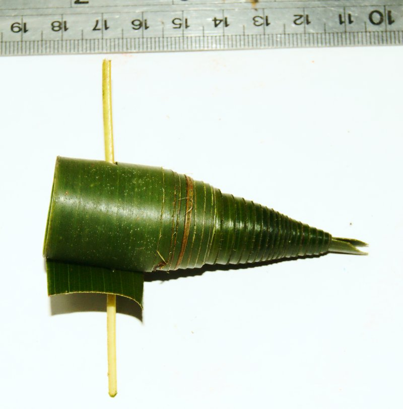 ഓലപ്പീപ്പീ